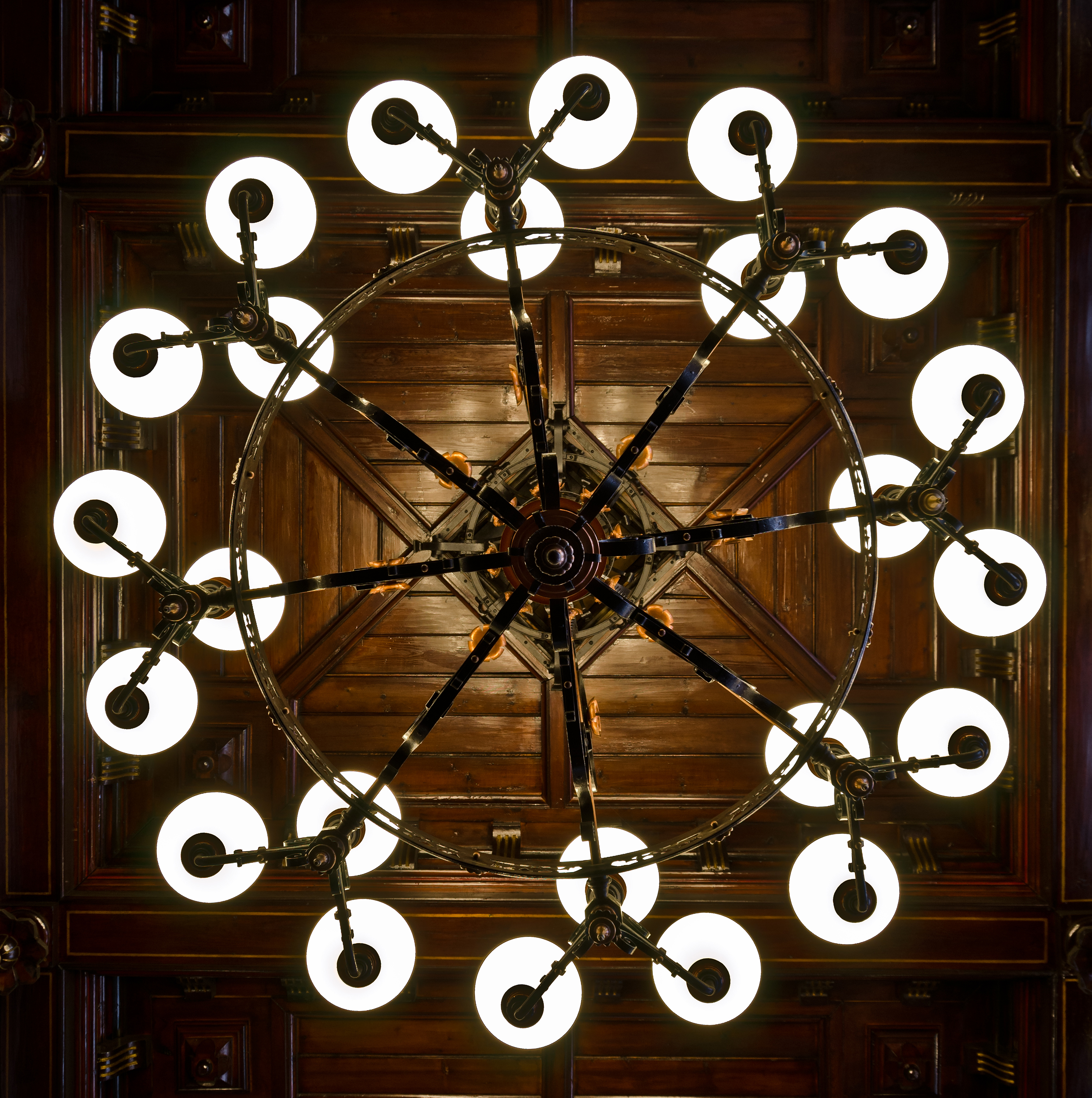 Kłodzko, ratusz, XVI, XVIII, 1890